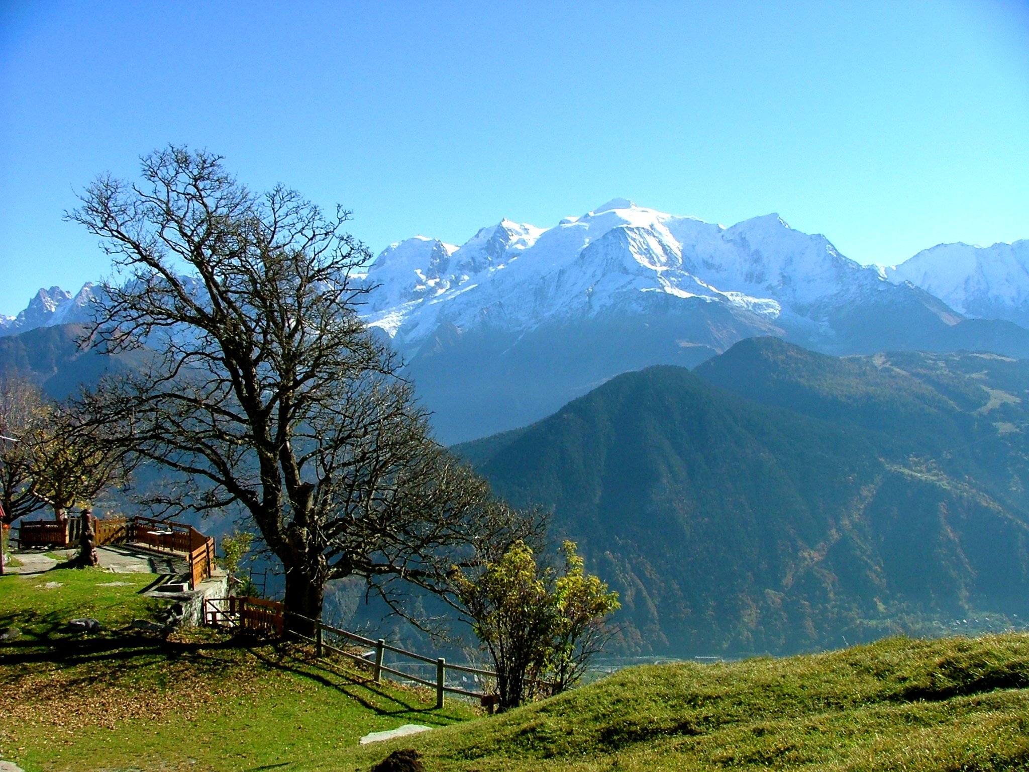 Description Vue du Mont-Blanc depuis les chalets de Varan, au dessus de Passy Mont-Blanc, picture taken from the chalets of Varan Source J'ai moi-même pris cette photo à l'aide d'un appareil Fujifilm S5000 I have taken this photo myself with a Fujifilm S5000 camera. Date 10/2005 Auteur TL Permission Vous pouvez utiliser cette image commercialement ou non. You can use this picture commercially or not if you want. Autres versions de cette image Pas d'autres versions connues No other version known.